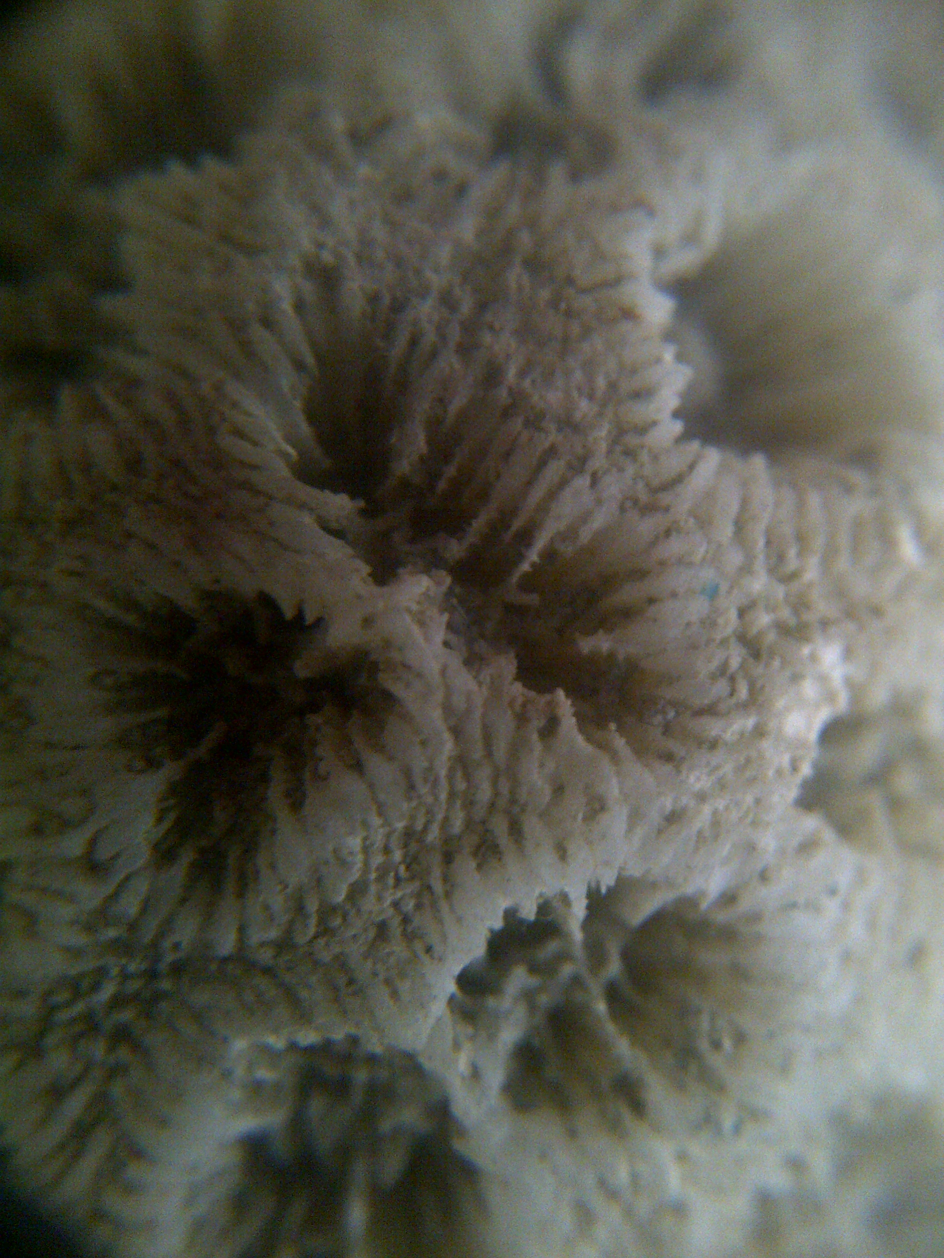 Imagen amplificada del esqueleto de un coral